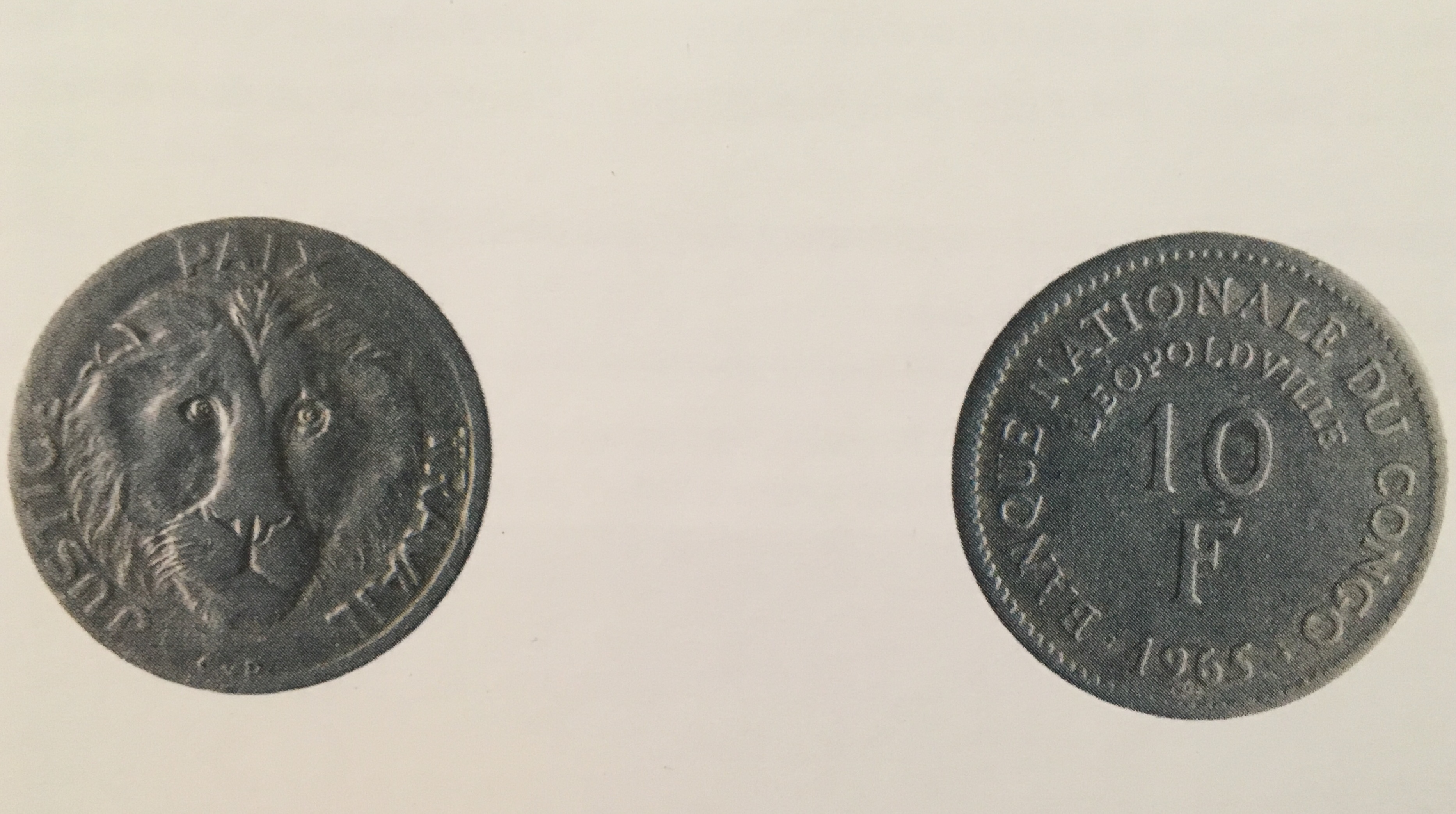 Pièce de 10 francs congolais à l'époque de Kasa-Vubu